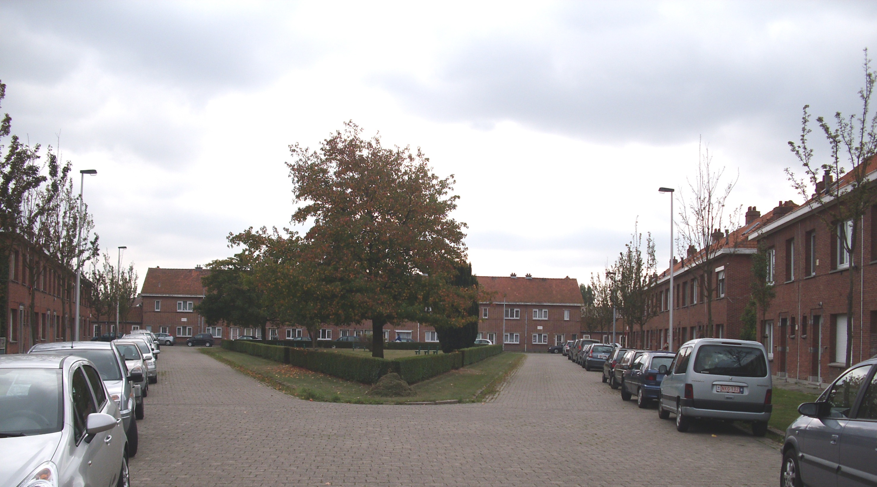 Gustaaf Eylenboschplein - Nieuw Gent - Gent - Oost-Vlaanderen - Vlaanderen - België